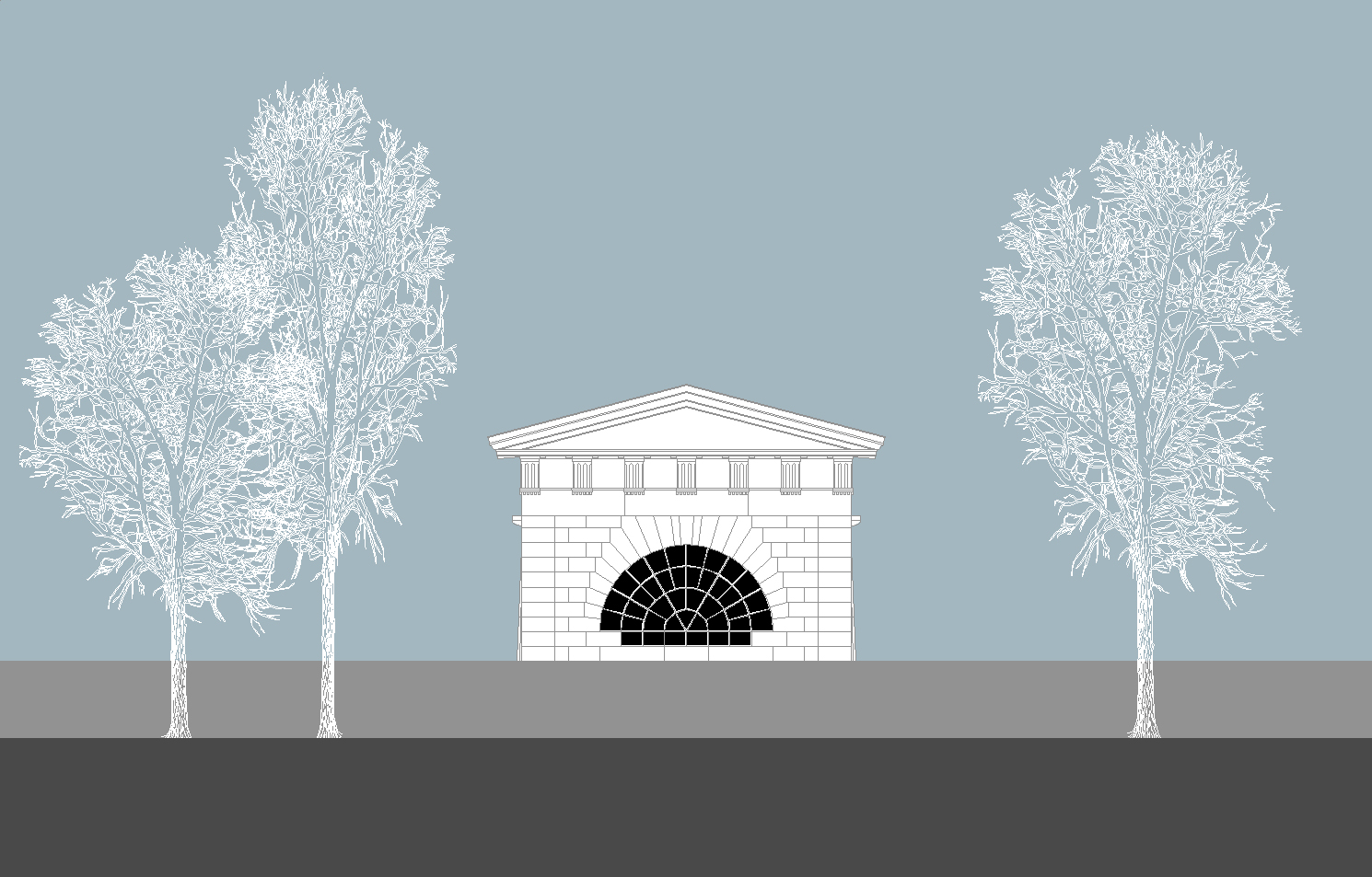 Mausoleum der Familie von Hoym, Ansicht NO. © Eiko Behrens